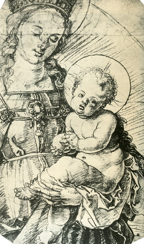 Богородиця: ескіз до вітражу